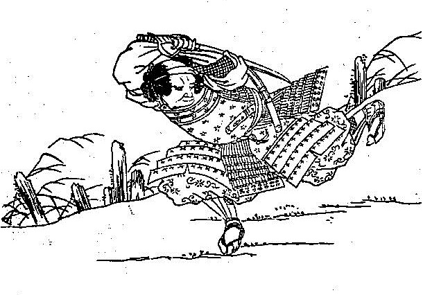 入江九一